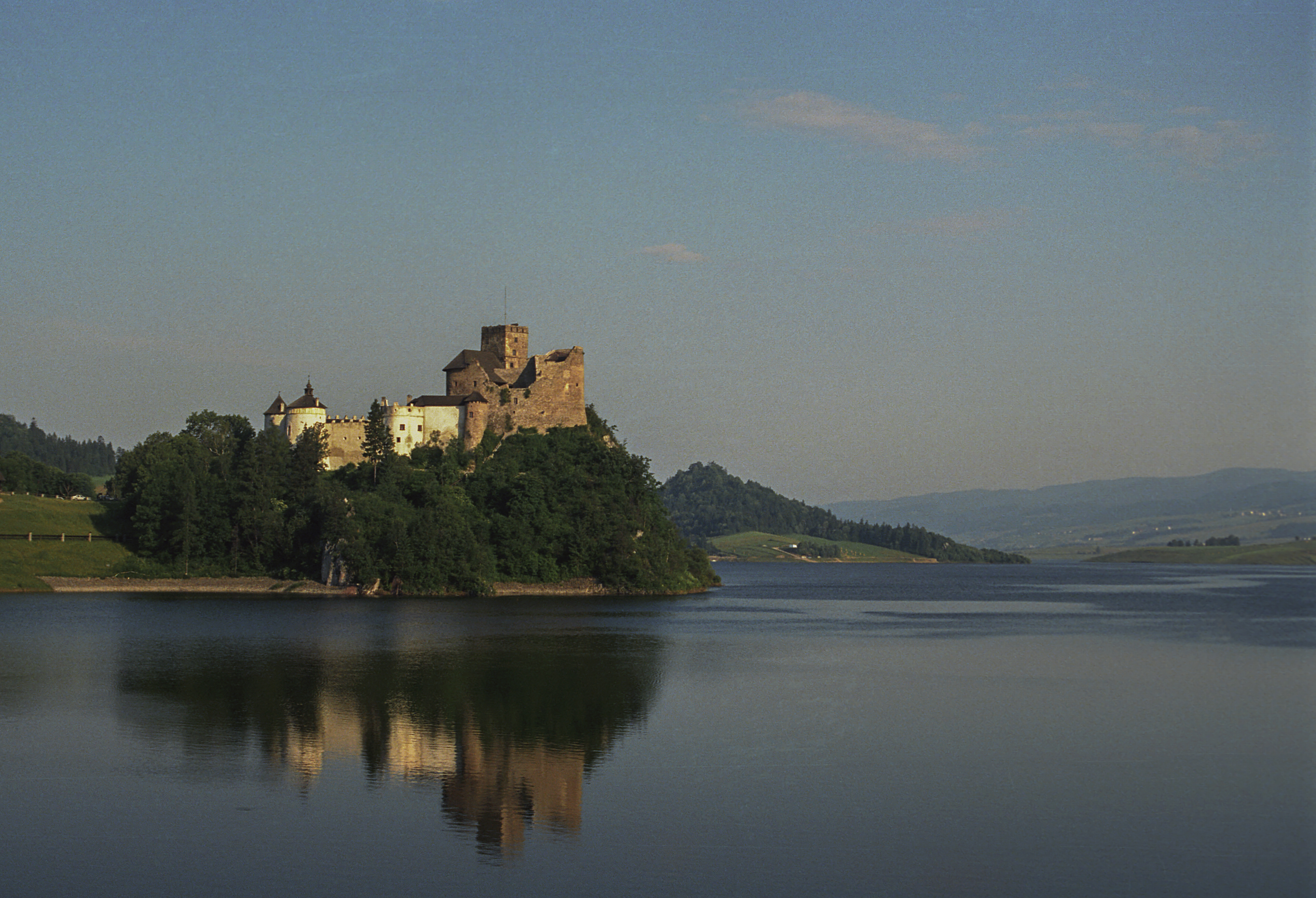 Poland, Niedzica Castle